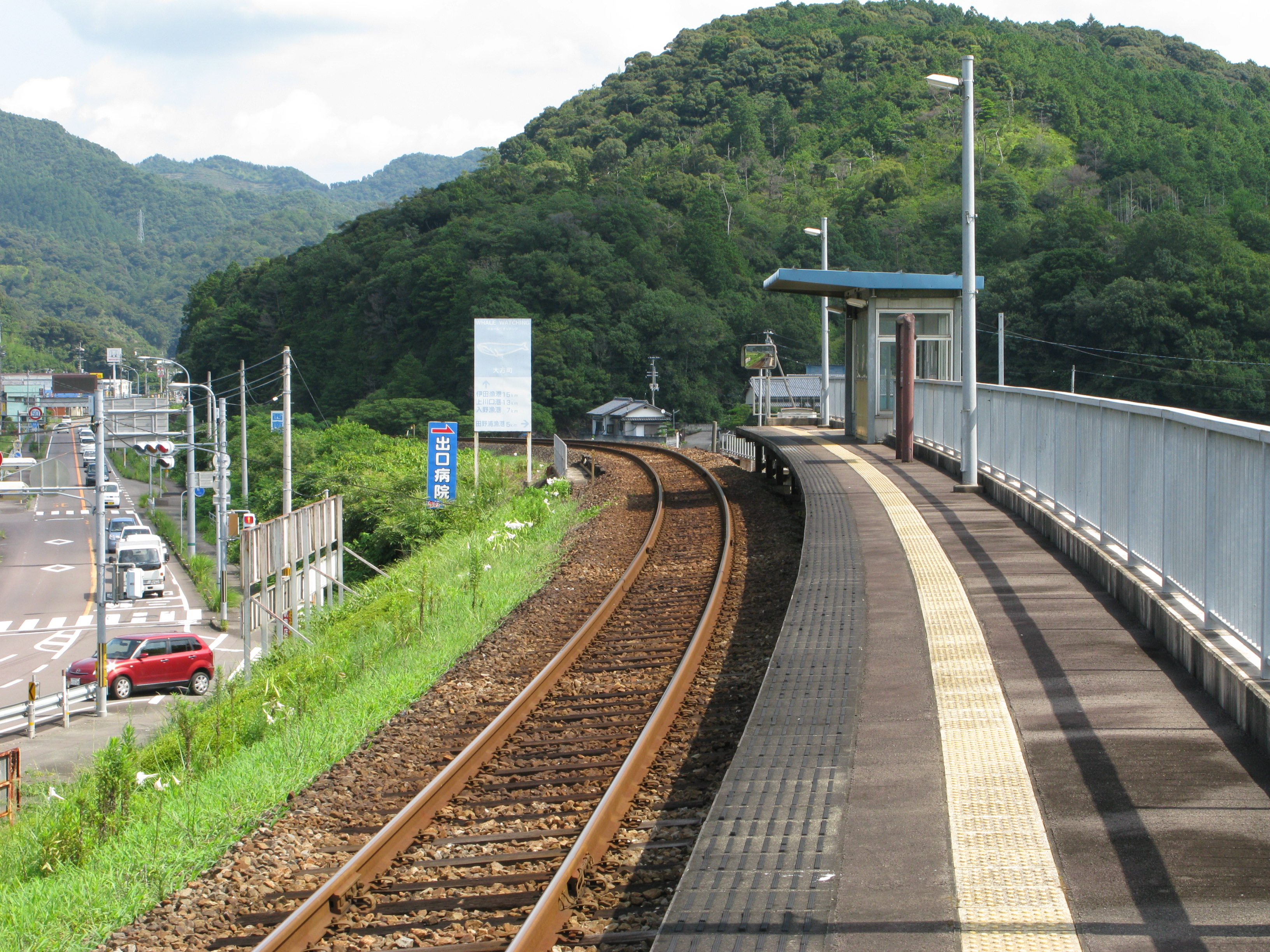 古津賀駅プラットホーム